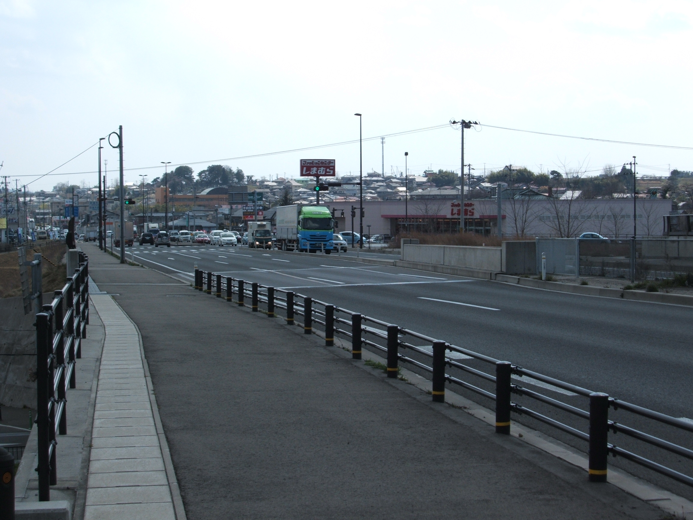 Tosakiro-tari- N